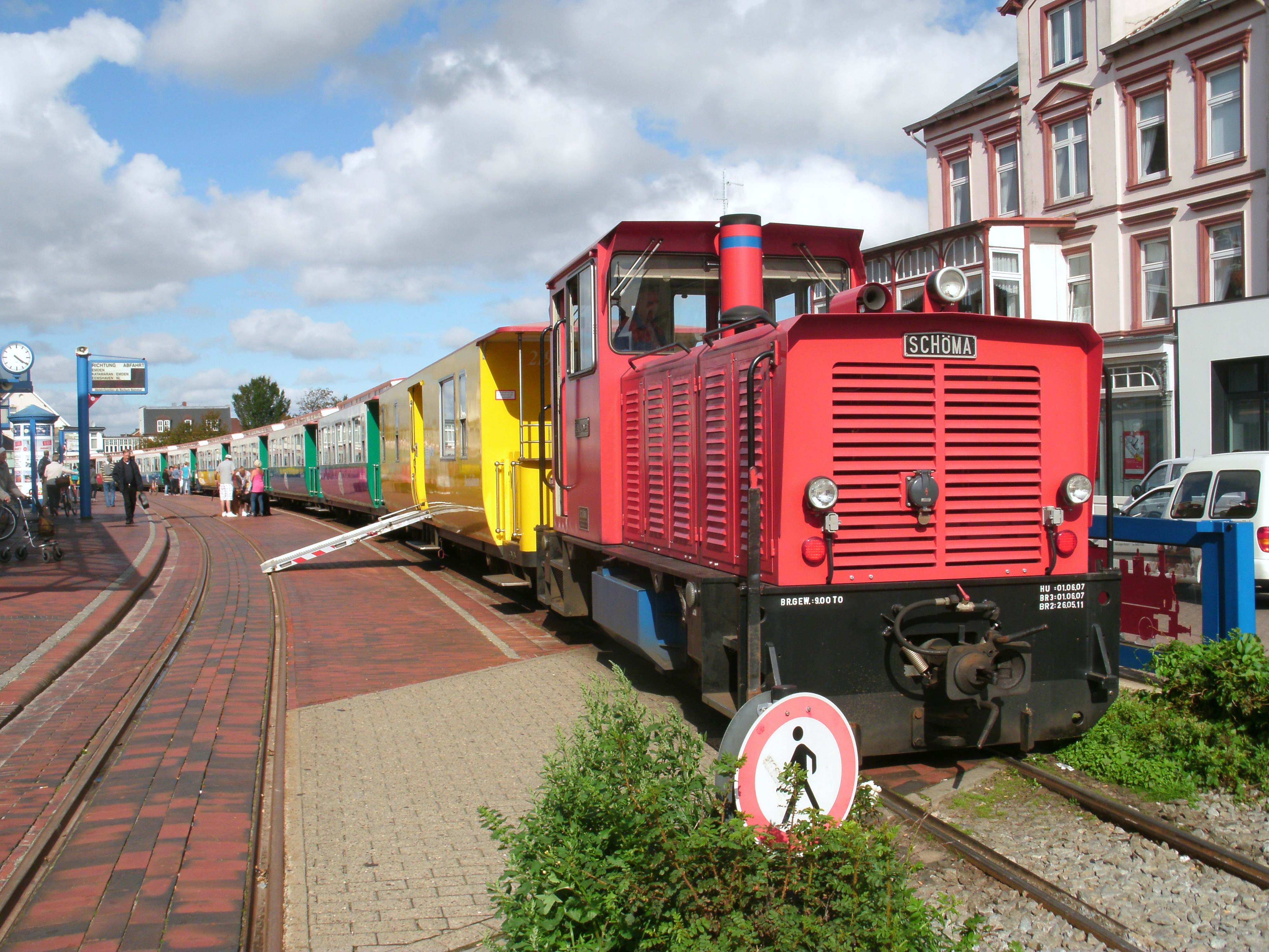 Moderner "Wendezug" der Borkumer Kleinbahn im Inselbahnhof, kurz vor der Abfahrt zur Reede